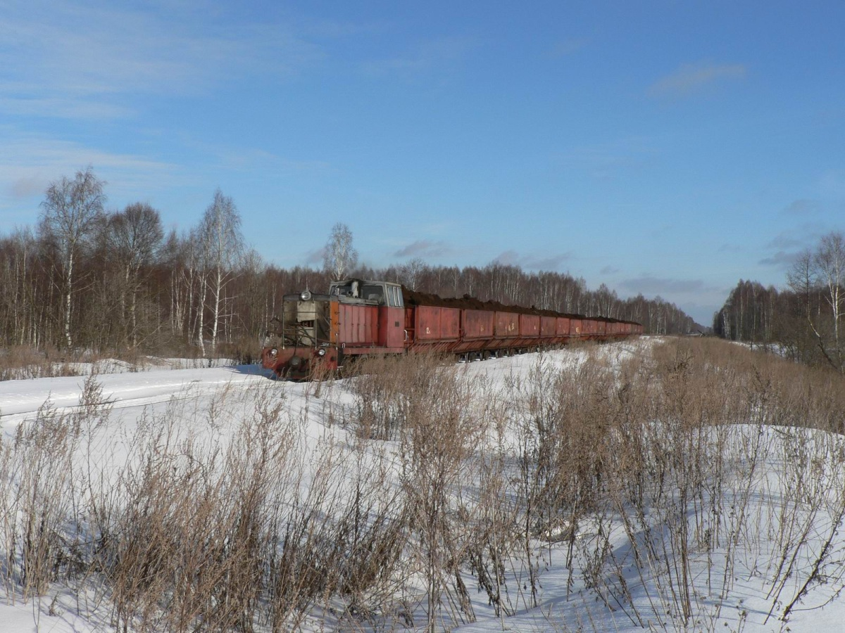 ТУ7А-3333 с грузовым поездом на перегоне 6-й пост - Перегрузочная, УЖД Мокеиха-Зыбинского т/пр